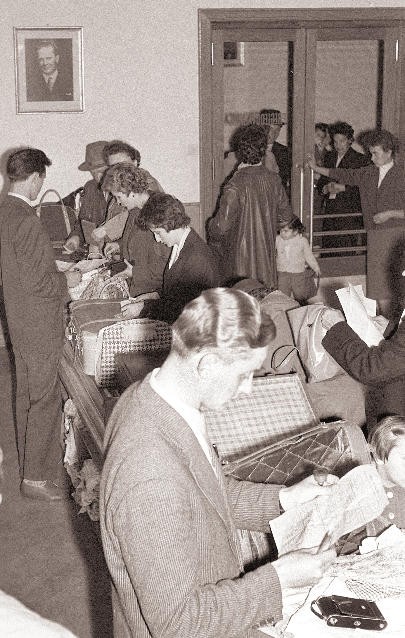 Carinska preglednica na mariborski železniški postaji.